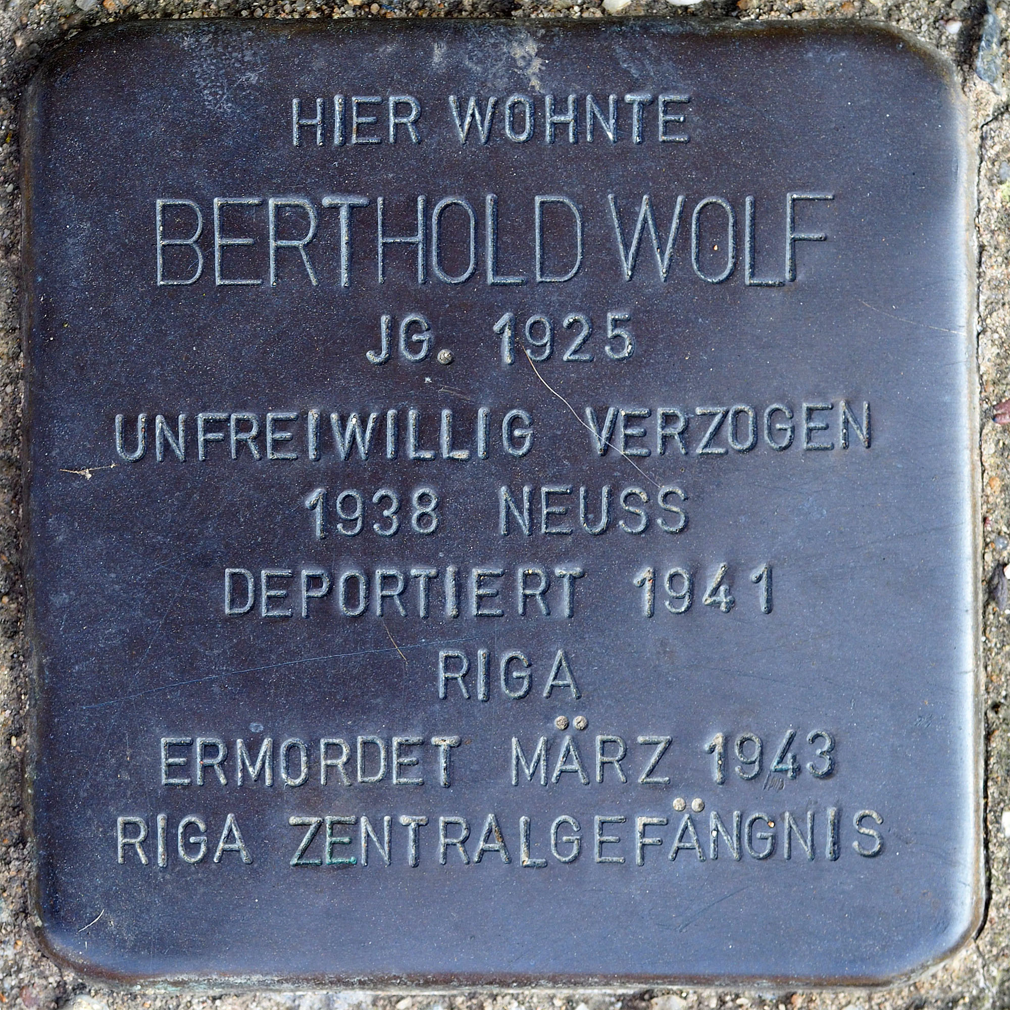 Stolpersteine GV: Wolf, Berthold